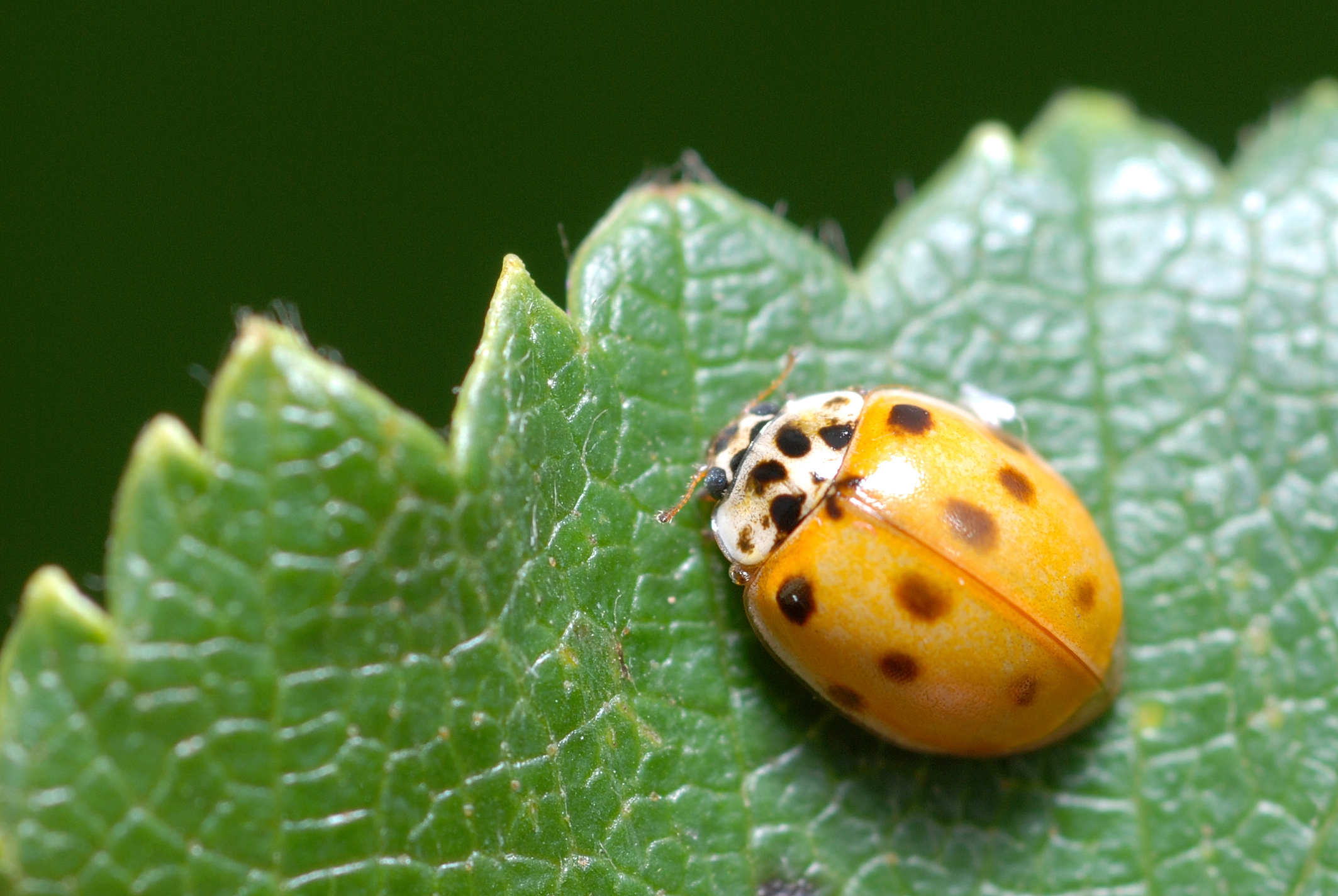 Adalia decempunctata